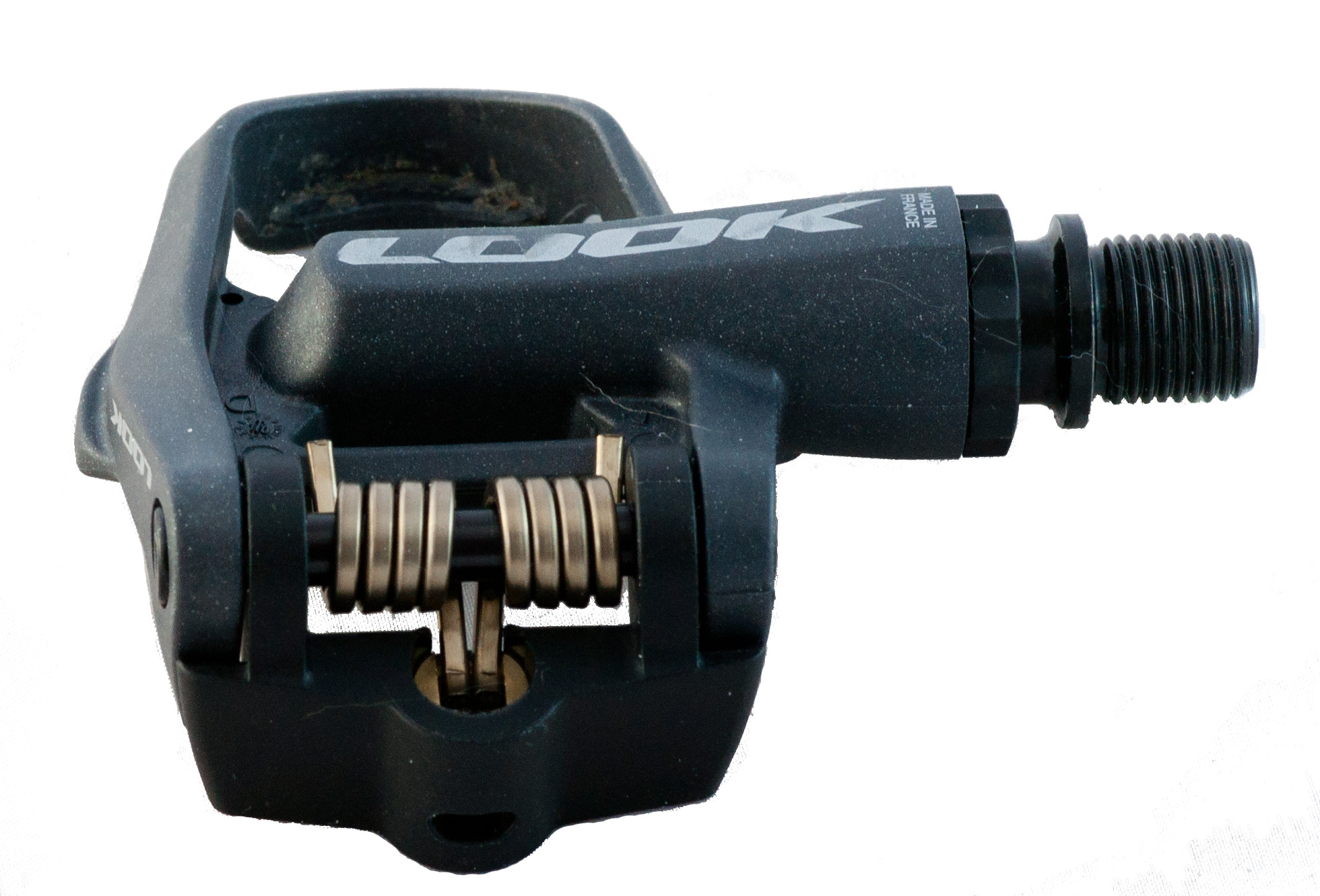 Pédale automatique Look, arrière vu de dessus.